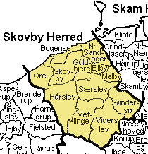 Skovby Herred Odense Amt, Denmark. Map by Svend-Erik Christiansen, edited by user:Nico-dk .